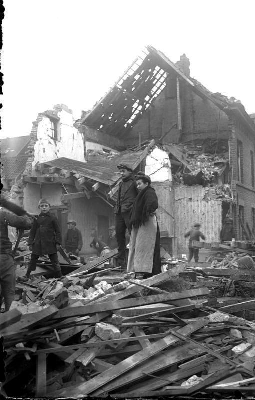 Wervicq, belgische Zivilbevölkerung auf den Trümmern ihrer Wohnstätte Mai 1916